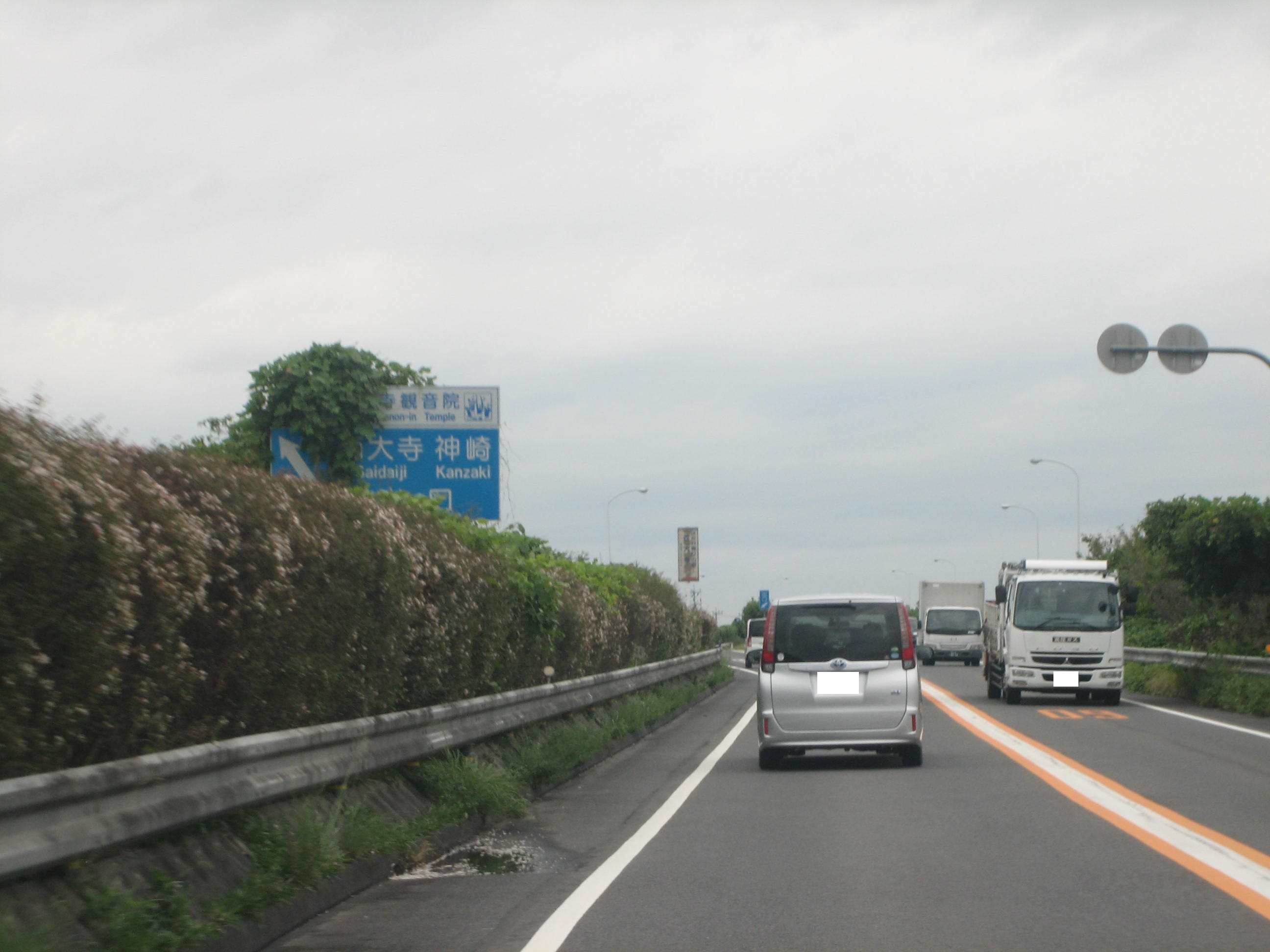 西大寺IC分岐